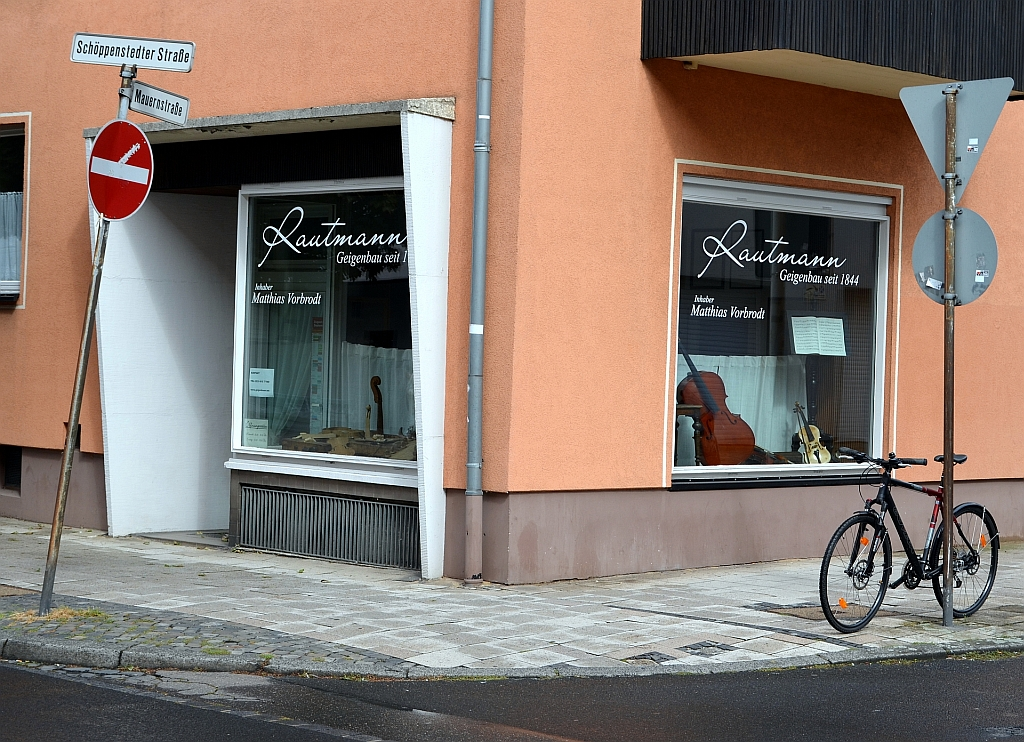 Braunschweig: Ladengeschäft des Geigenbauunternehmens Rautmann, Schöppenstedter Straße, Ecke Mauernstraße.